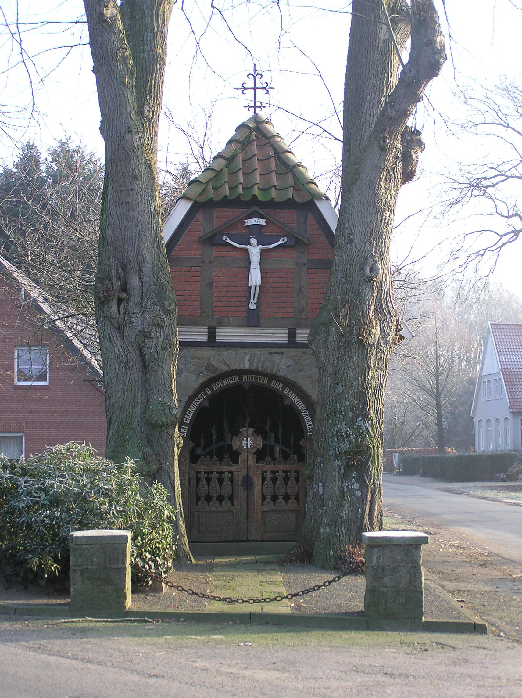 Heeker Klause in Heeke, Ortsteil von Alfhausen, Niedersachsen